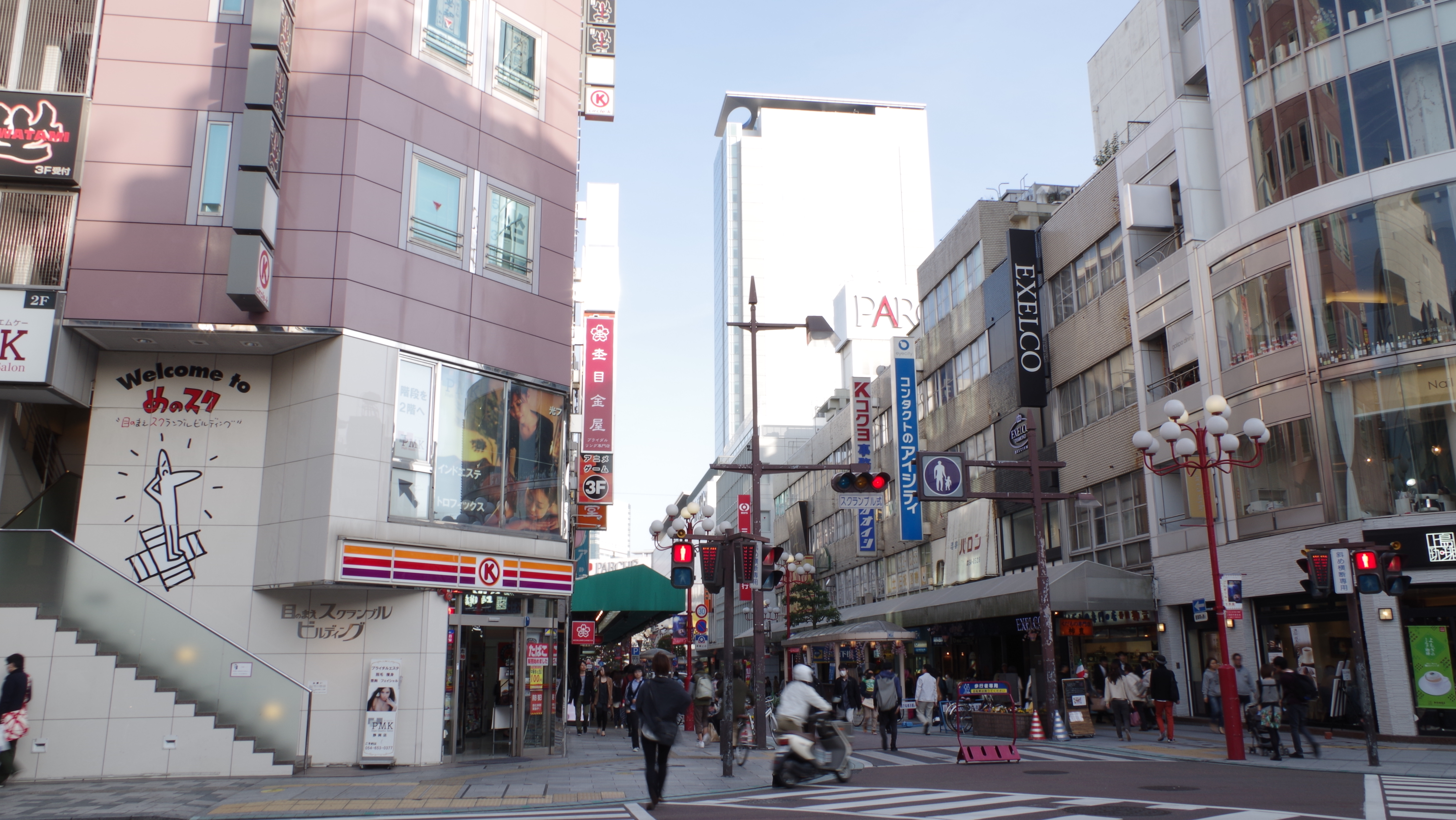 2 Chome Gofukuchō, Aoi-ku, Shizuoka-shi, Shizuoka-ken 420-0031, Japan